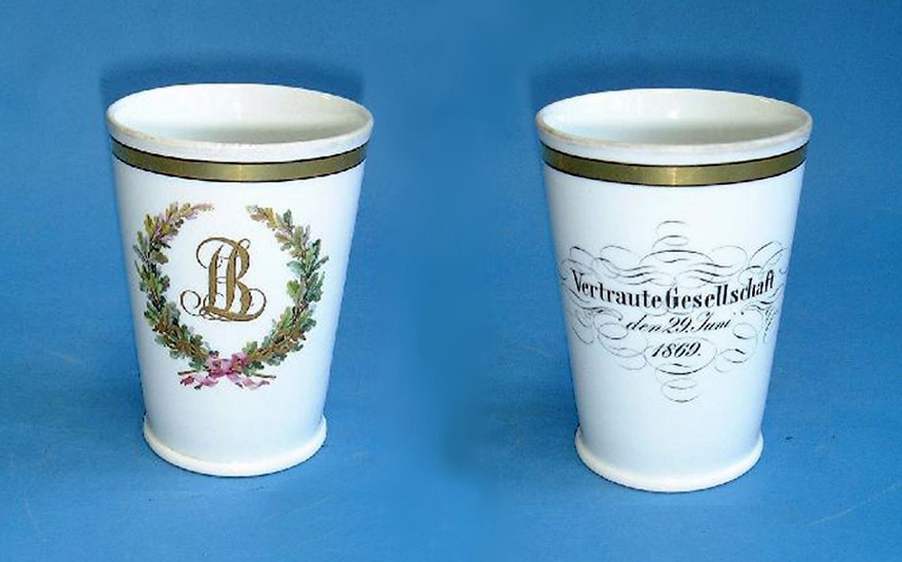 Becher der Vertrauten Gesellschaft Leipzig aus Meißner Porzellan